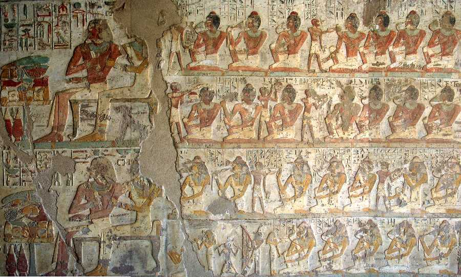 Banquet funéraire, tombe de Paheri, El Kab